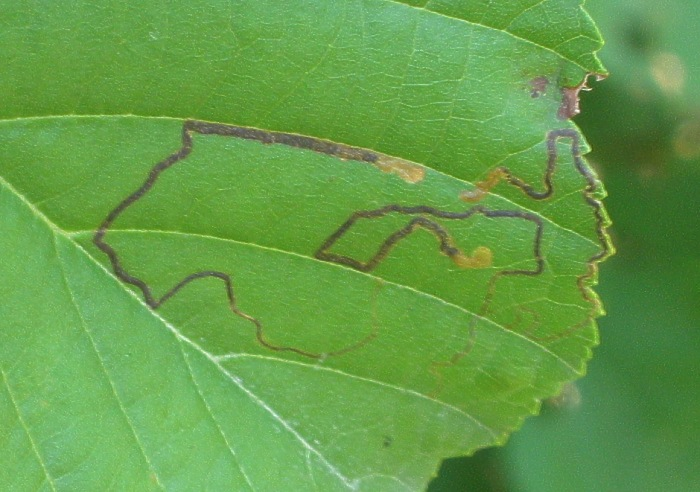 Raupe und Mine von Stigmella glutinosae